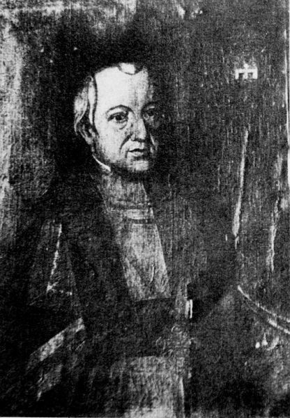 Беларуская (тарашкевіца): Партрэт Фэліцыяна Валадковіча (Felicyjan Vaładkovič)